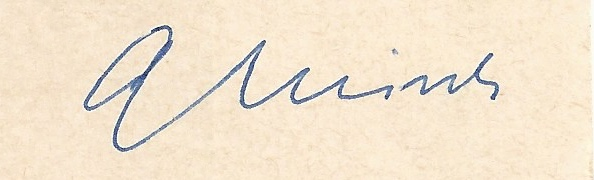 Georg Misch. Seine Signatur auf einer von ihm am 22.07.1959 handgeschriebenen Postkarte an mich